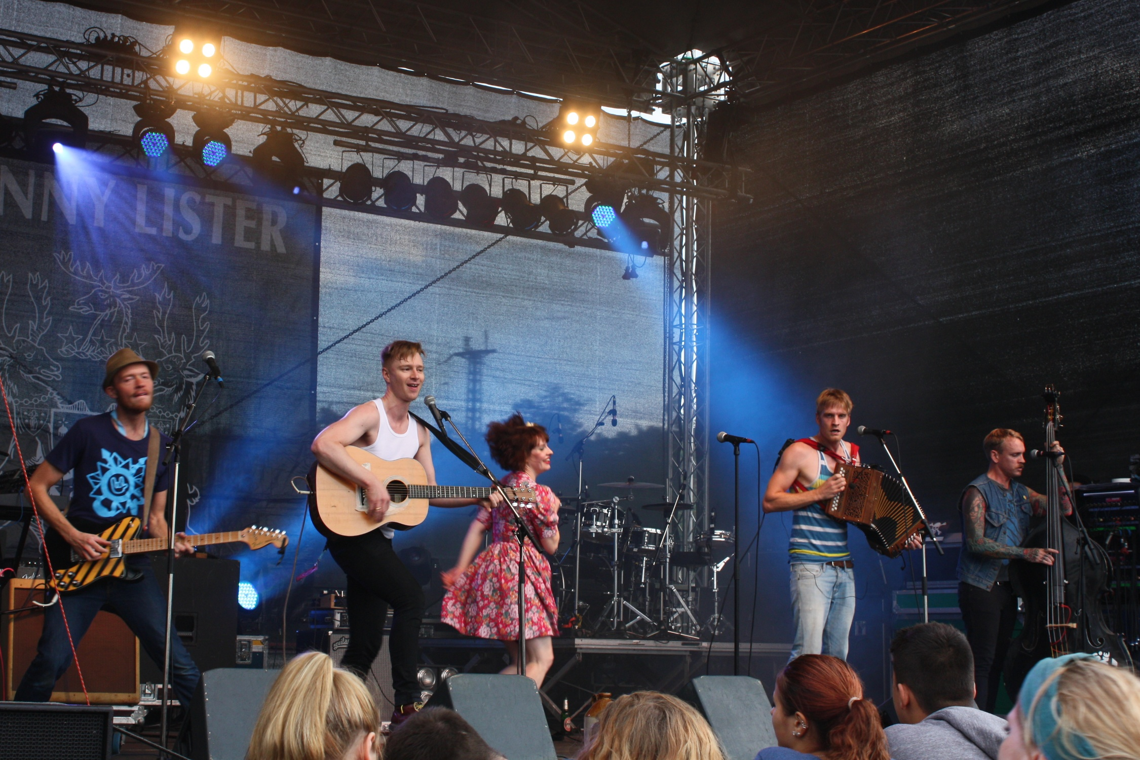 Folklore 013 in Wiesbaden, Auftritt der Gruppe Skinny Lister